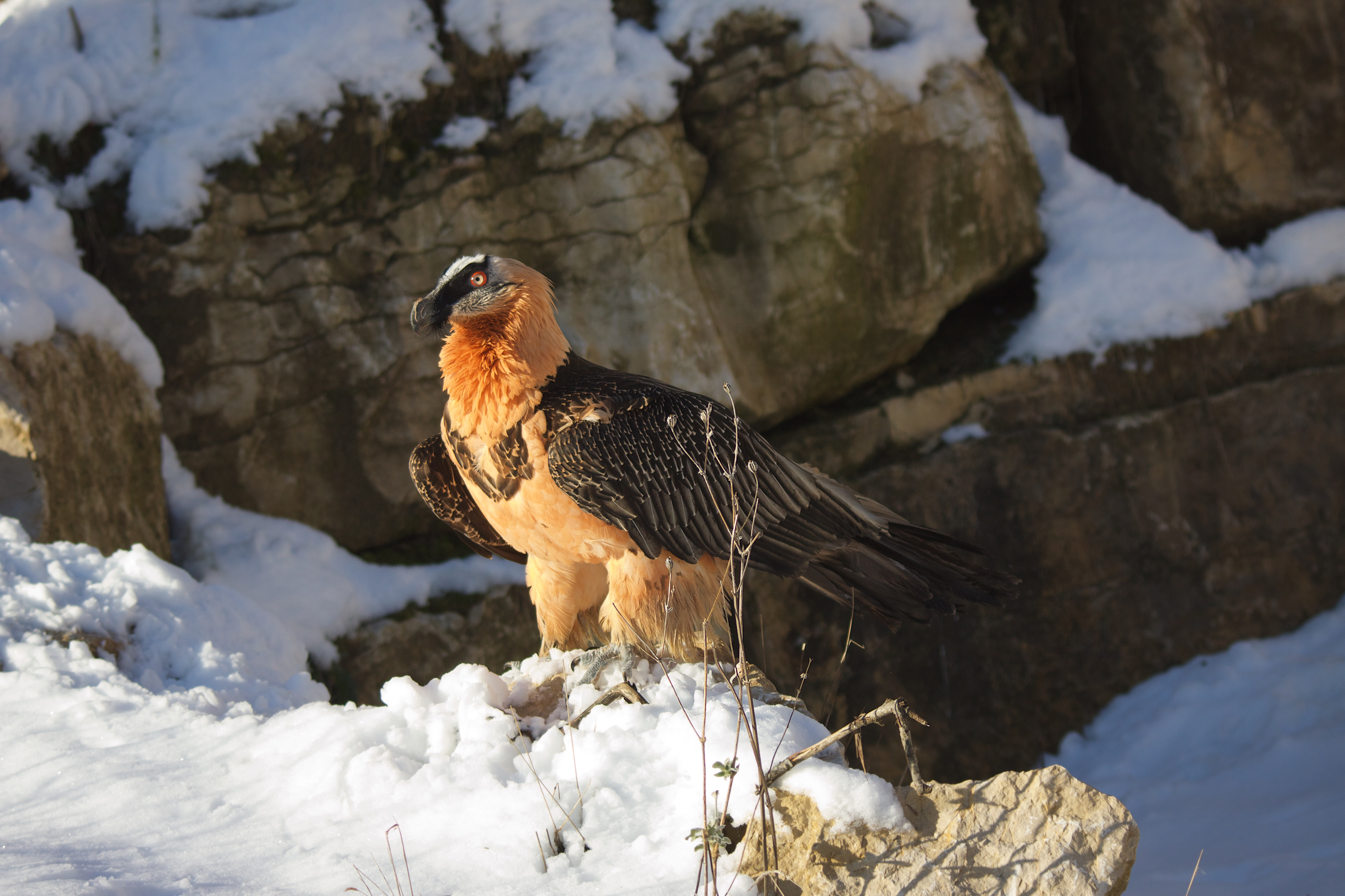 photo